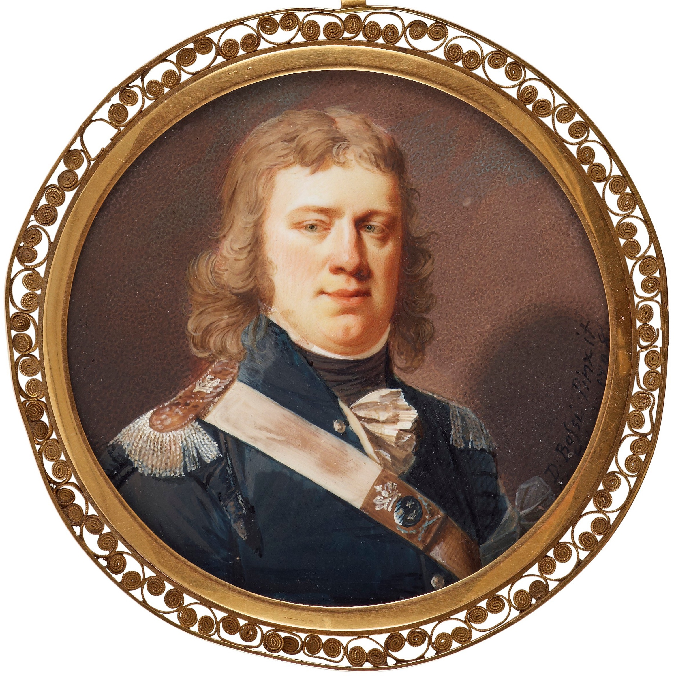 Porträtt av officer iklädd uniform m/1792 för artilleriet. Hans epålett visar en kunglig krona, samt att han bär riksvapnet på sitt bantuer, vilket visar att han är konungens överadjutant. Föreställer troligen Paul Schröderstierna vid Svea Artilleriregemte. Signerad D. Bossi pinxit och daterad Stockholm 1798. Gouache på ben 6,5 x 6,5 cm. Innefattad i guld stämplad Friedrich Fyrwald, Stockholm 1798.